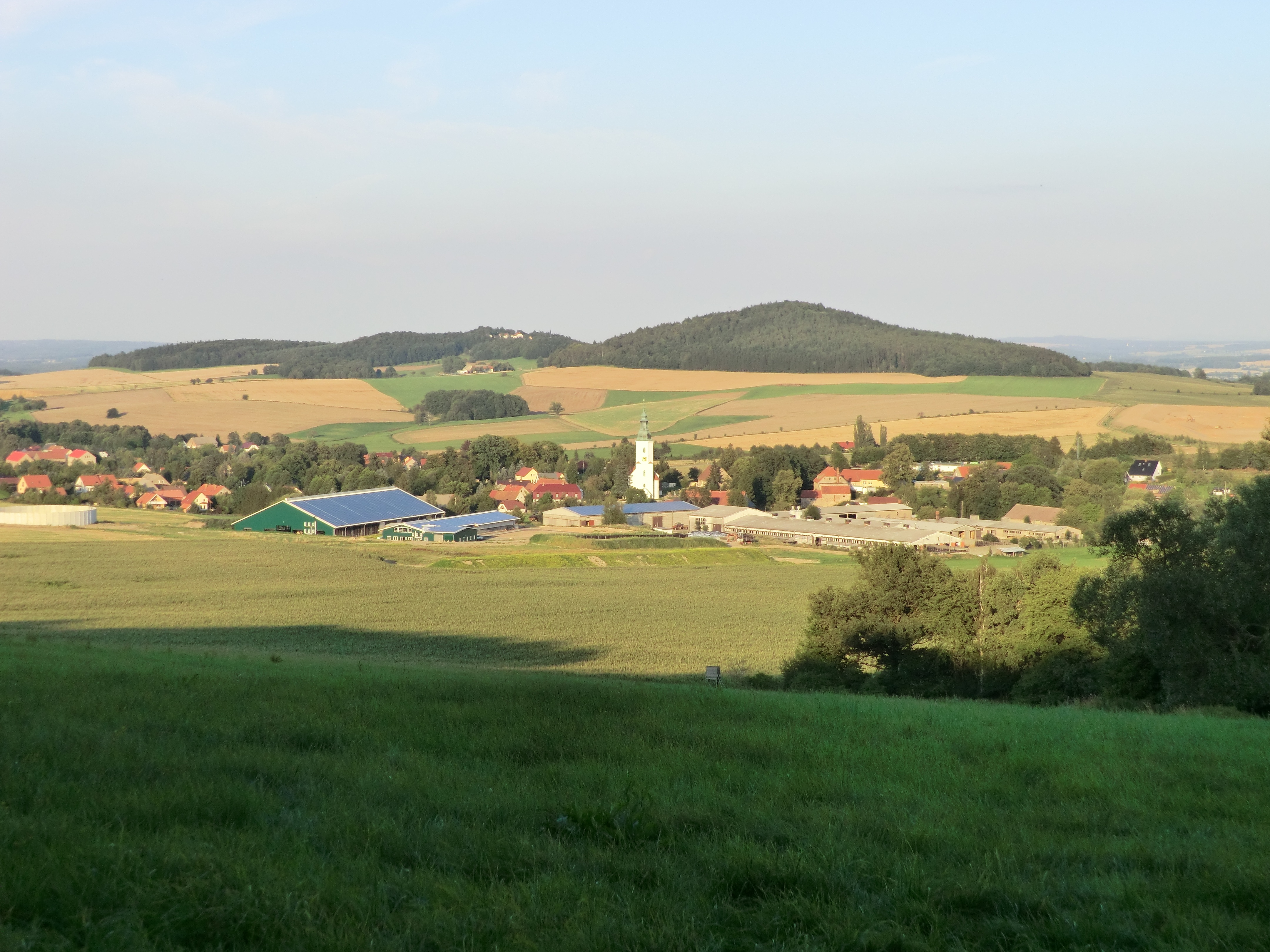 Blick vom Friedersdorfer Berg über Friedersdorf in Richtung Schwarzer Berg